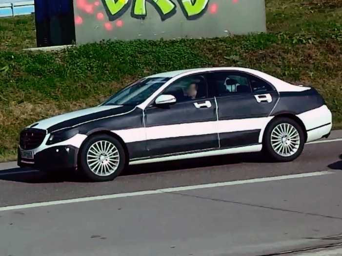 Erlkönig eines Mercedes-Benz W205 (C-Klasse)